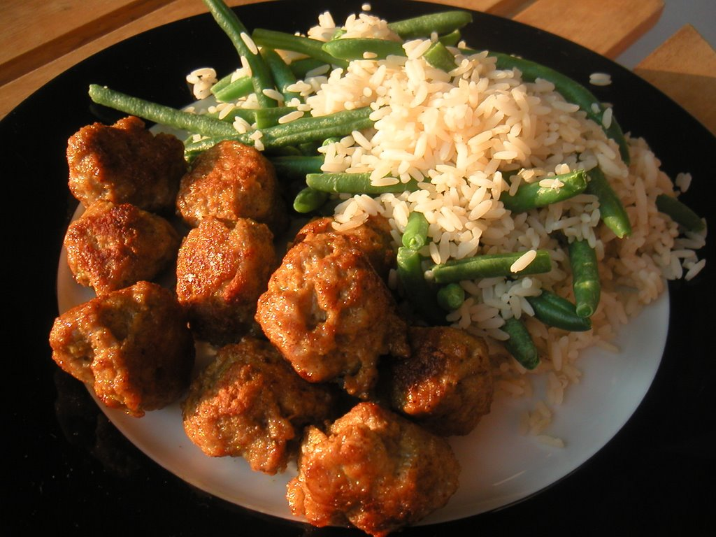 Kyllingefrikadeller med ris og bønner